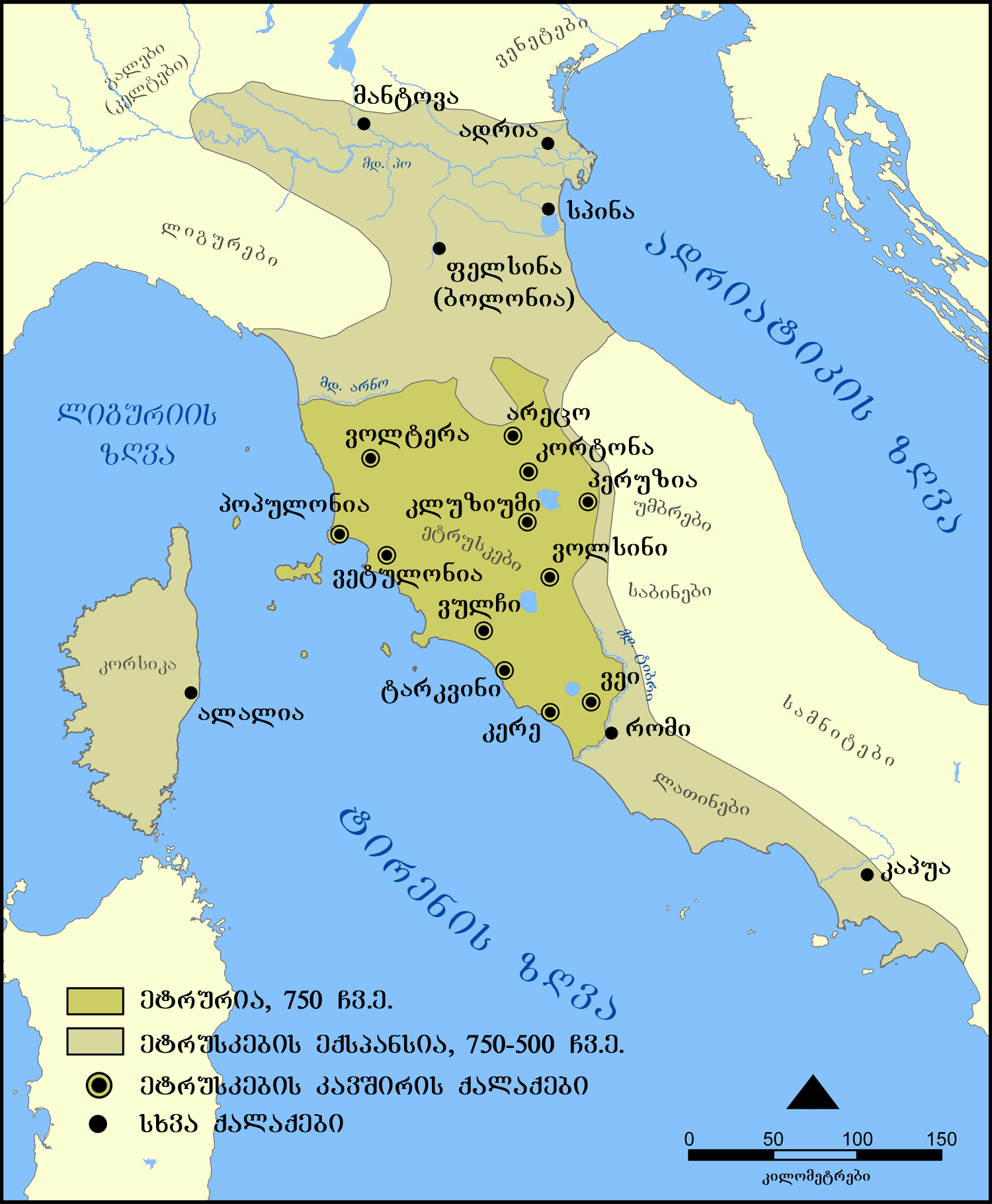 ეტრუსკული ცივილიზაციის რუკა.